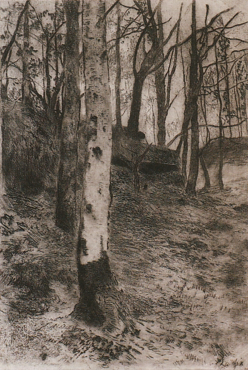 A Study